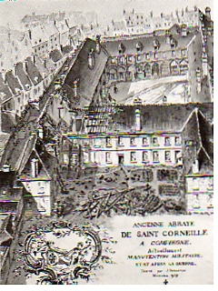 abbaye Saint-Corneille famille Mottet, Picardie